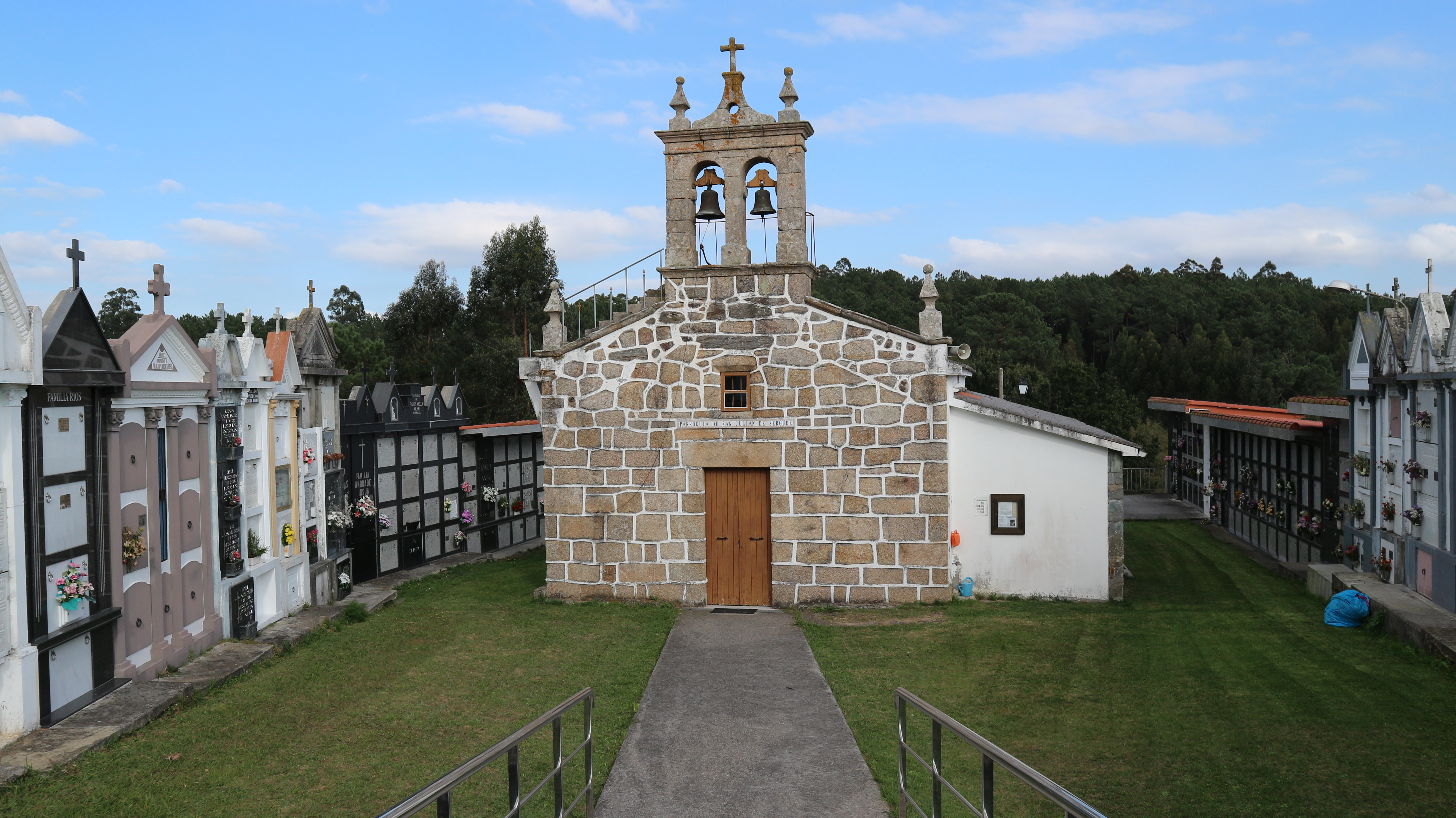 Igrexa de San Xián de Sergude. San Xián, Sergude, Carral.